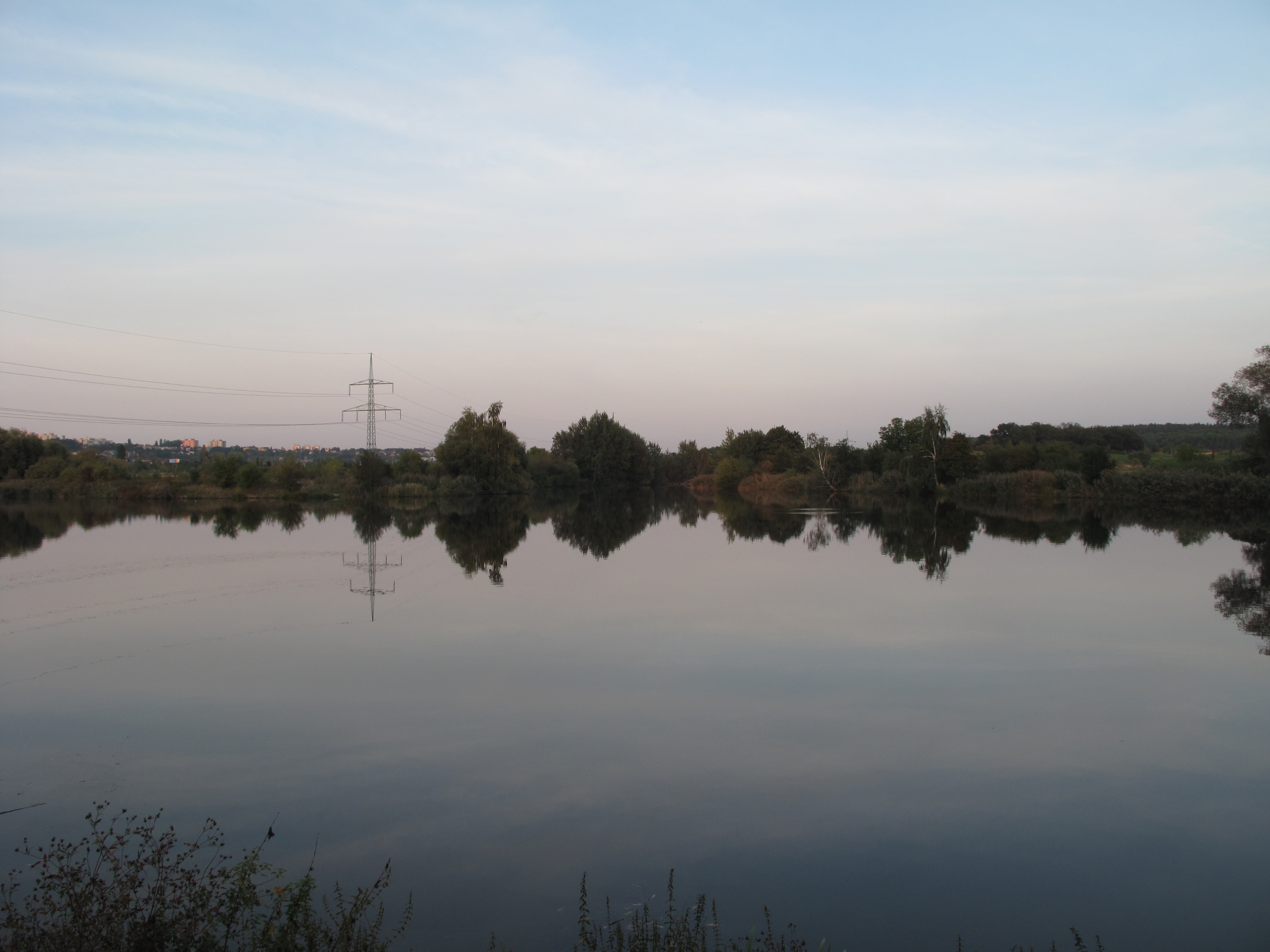 Martiňák (Čeněk). Praha, Česká republika.